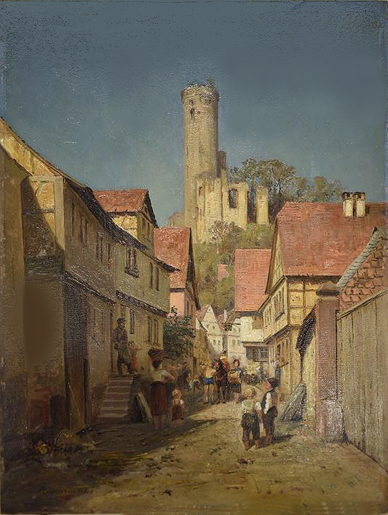 Ulica wraz z ruiną zamku